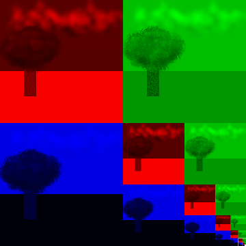 Image de base pour illustration du MIP mapping en RGB